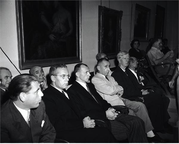 ירושלים - ועדת האו"ם.